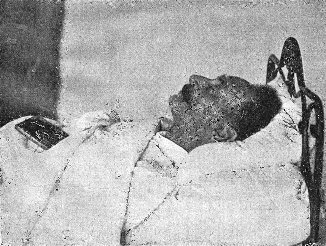 Генерал-лейтенант Пётр Аполлонович Грессер на смертном одре